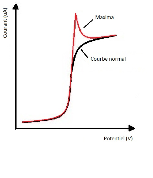 Démonstration de l'effet de la convection sur une analyse polarogaphique.